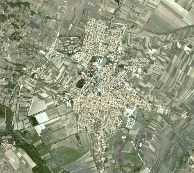 Satellitenaufnahme der Stadt Negotin in der Gemeinde Negotin in Serbien.